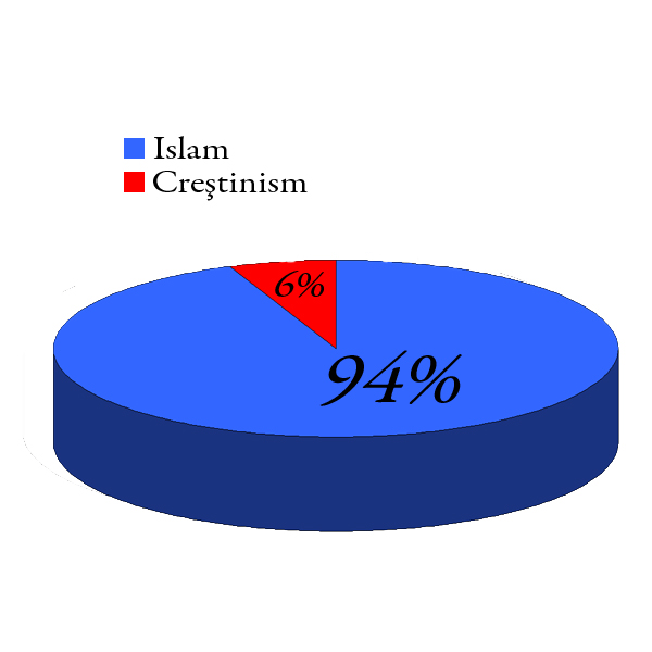 Procentul religiei în oraşul Djibouti